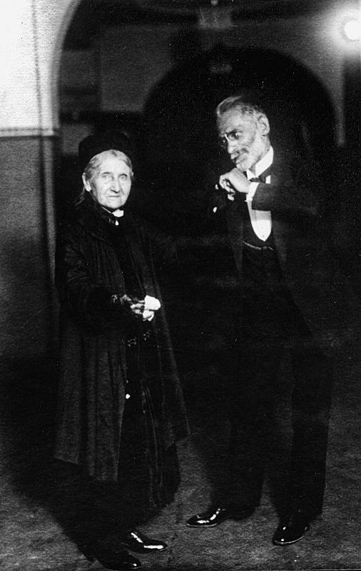 Anna Tuschinski kaj Felikso Zamenhof dum la 19a UK, Dancigo 1927